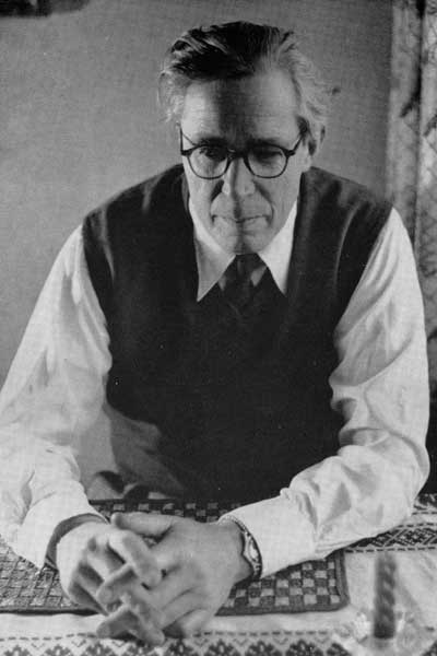 Gustav Sandgren